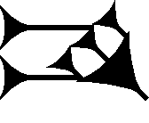 Cuneiform sign